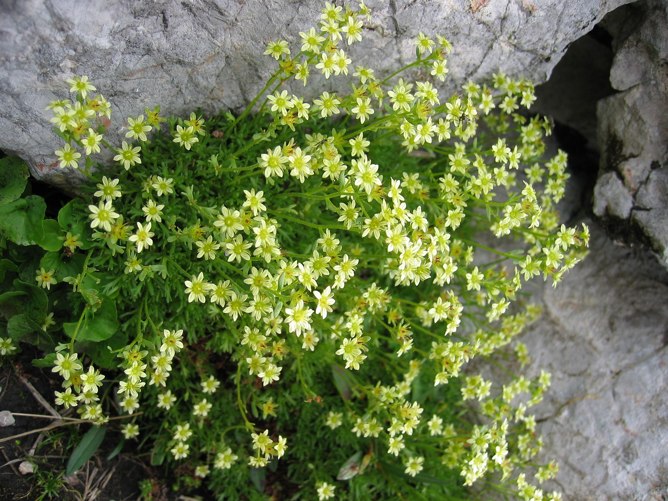 Saxifraga moschata, Dachstein, Upper Austria, Austria